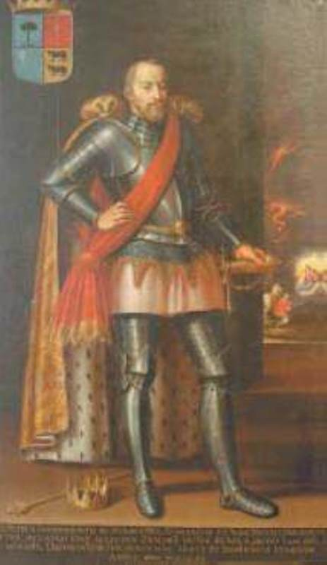 Retrato de Pedro de Atarés (Museo de Zaragoza), nacido en el año de 1083 y fallecido en Borja, el 21 de febrero de 1152. Fue señor de Atares, de Javierrelatre y de Borja. Ha sido considerado, en opinión de unos, más otros lo refutan por considerarlo sin base real concreta, el ascendiente fundador de la Casa de Borja o Borgia.